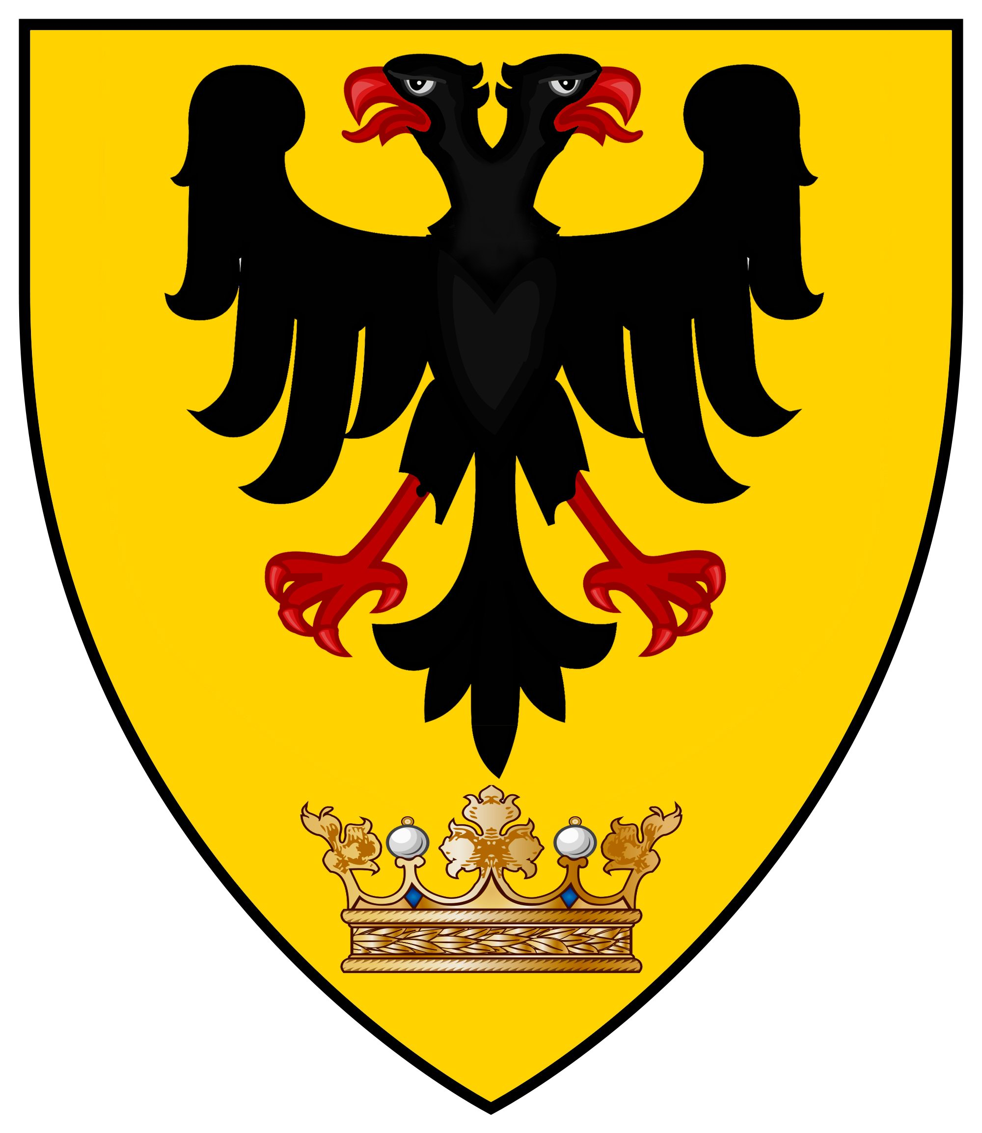 Balogh nembeli Széchy